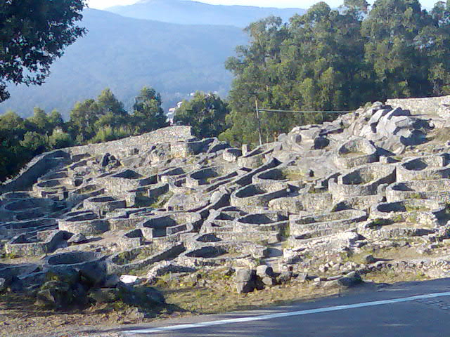 Castro de Santa Tegra